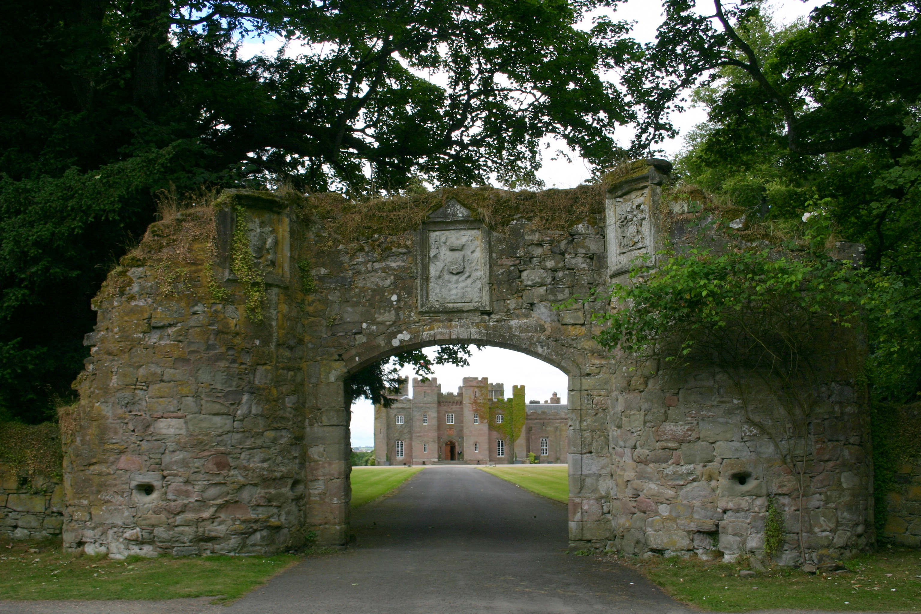 Scone Palace